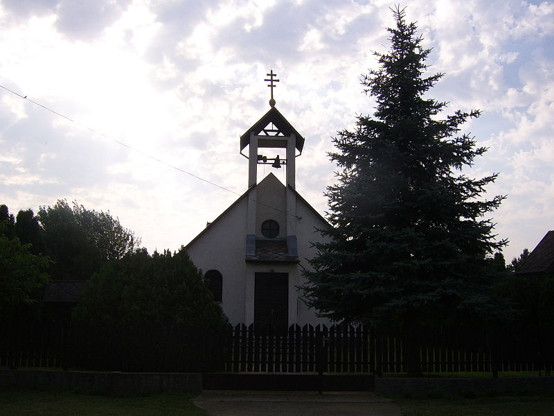 Abapuszta